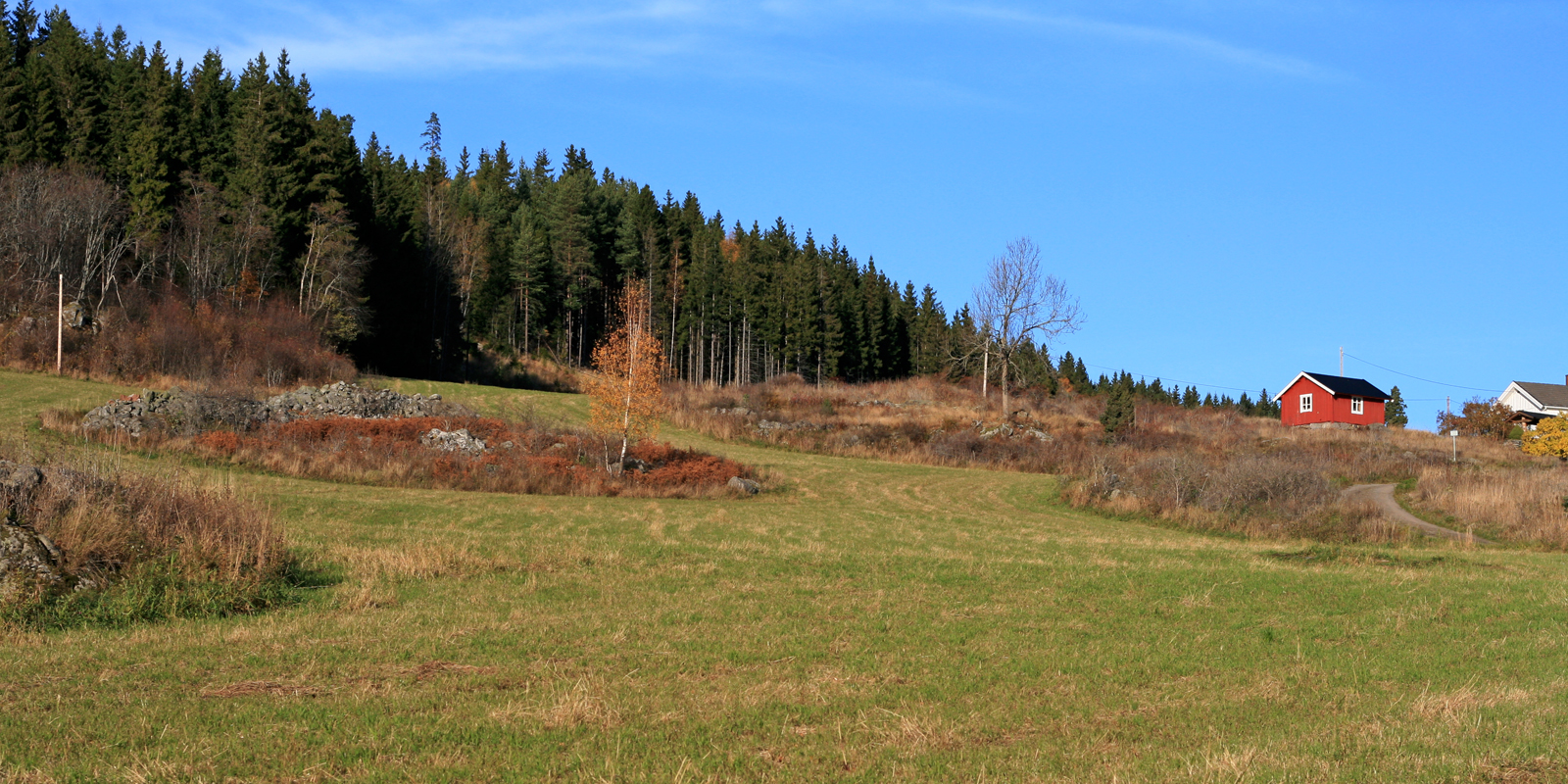 Jorde med åkerholmer og rydningsrøyser. Svenskerud, Stange.